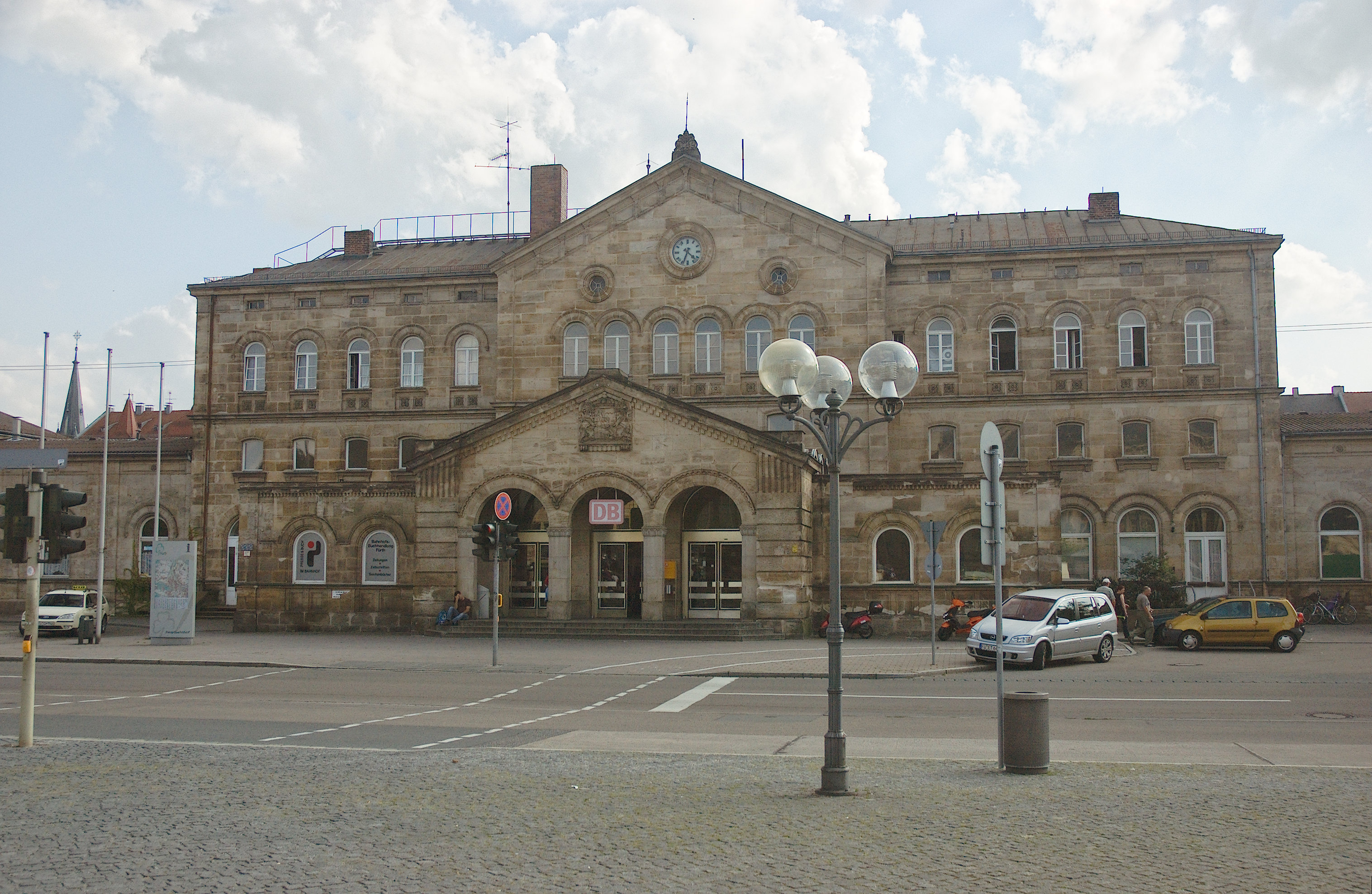 Hauptbahnhof in Fürth